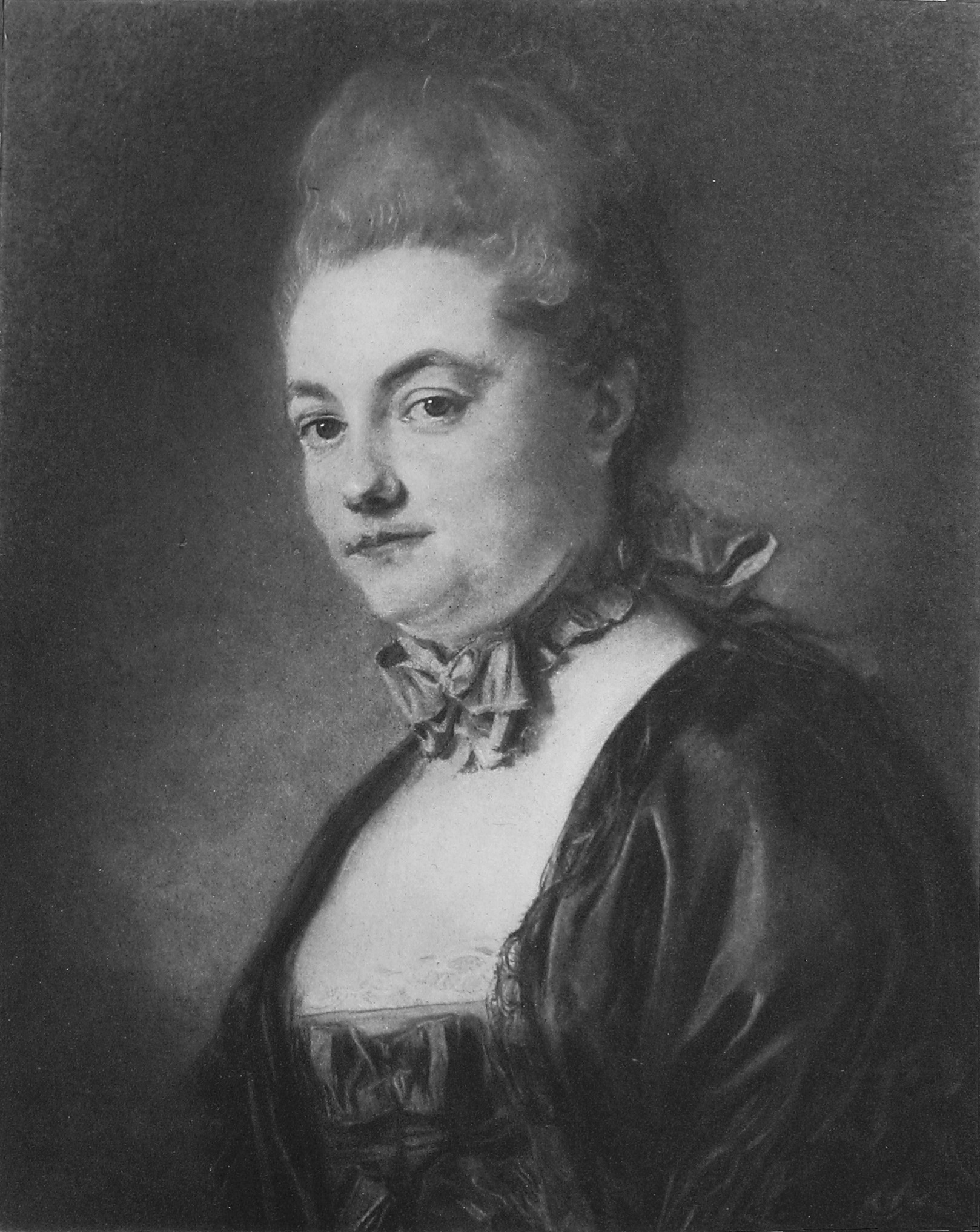 Jean-Baptiste Perronneau (1715–1783): Die Sopranistin Marie-Thérèse Laruette geborene Vilette (1744 –1837), Gattin des Baritons und Komponisten Jean-Louis Laruette (1731–1792). Pastell, 54 x 43 cm. Sammlung Henry Michel-Lévy.